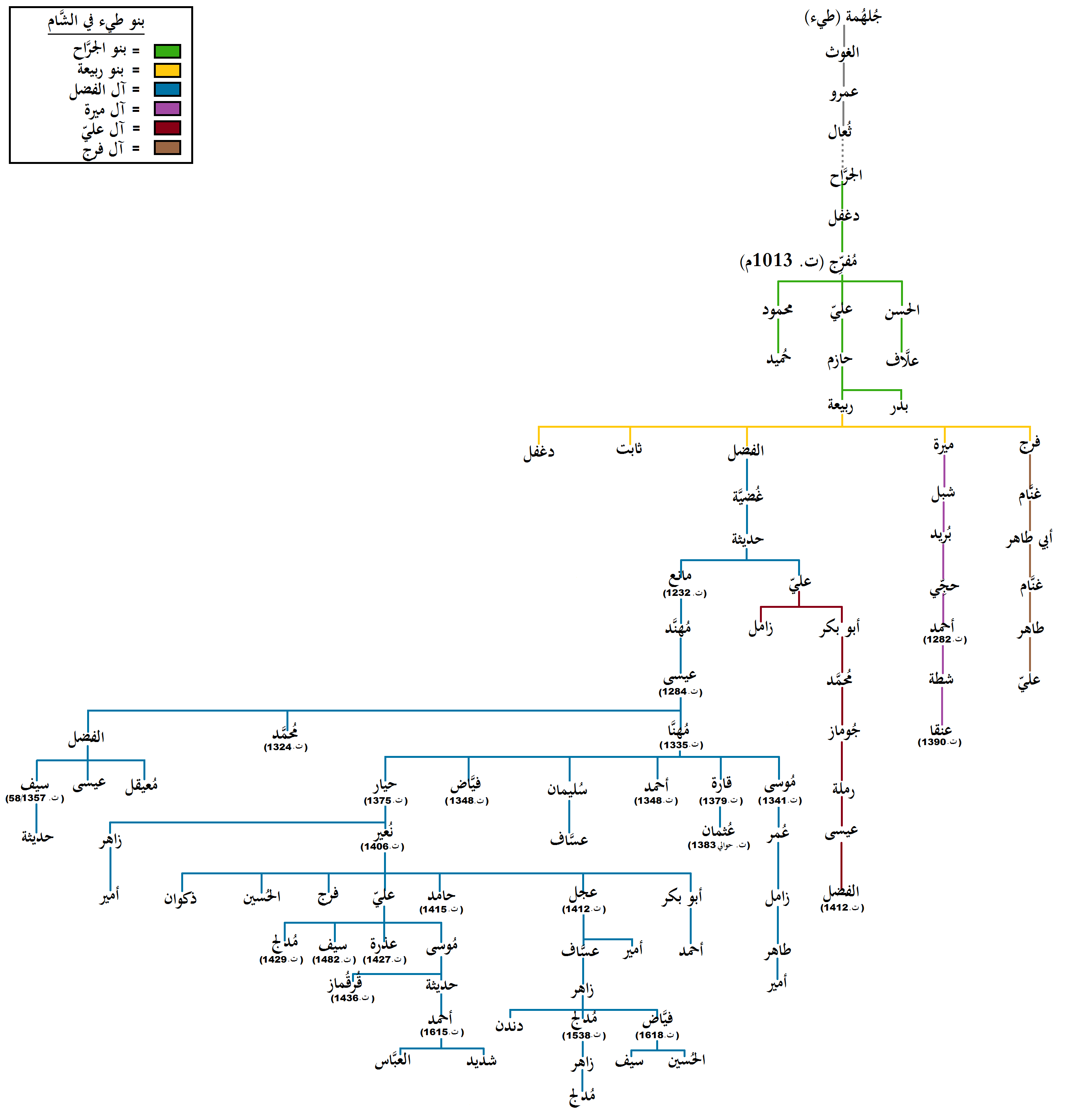 شجرة نسب بنو طيء في الشَّام تُظهر تفرُّعات هذه القبيلة العربيَّة العريقة.